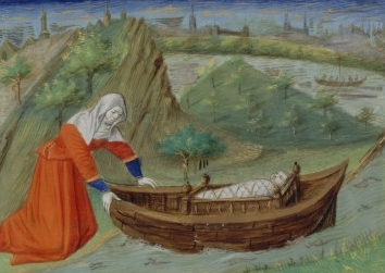 Yokébed se sépare de son fils Moïse (cf. Exode, chap. 2).